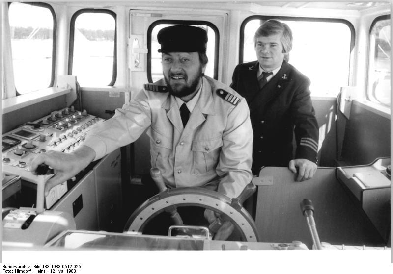 Berlin, Werftübergabe eines Schiffs ADN-ZB Hirndorf 12.5.83-hkc- Berlin: Yachtwerft übergibt Schiff- Die Schiffbauer der Yachtwerft Berlin übergaben das 36. Schiff aus der laufenden Serie - das Fahrgastschiff "Pionyr" für die CSSR - an den Auftraggeber. Der Schiffsführer Bernhard Gilbert (l.) von der Werft übergibt die Kommandobrücke an den Maschinisten Franz Plasek aus der CSSR.